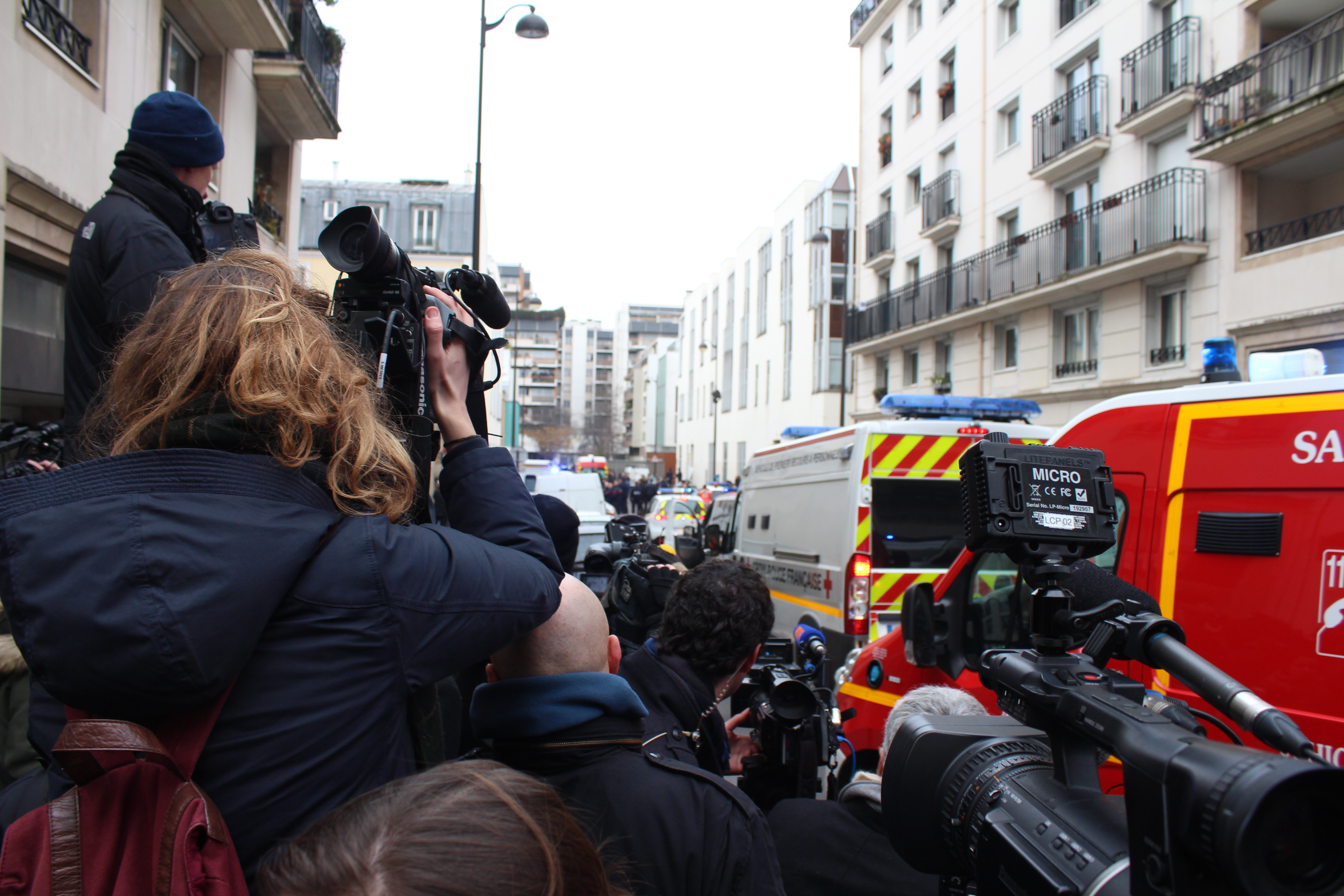 Vue de la zone du 11e arrondissement interdite aux badauds par la police après la fusillade au siège de Charlie Hebdo, prise avec l'aide du journaliste de LCP Jérémie Hartmann.